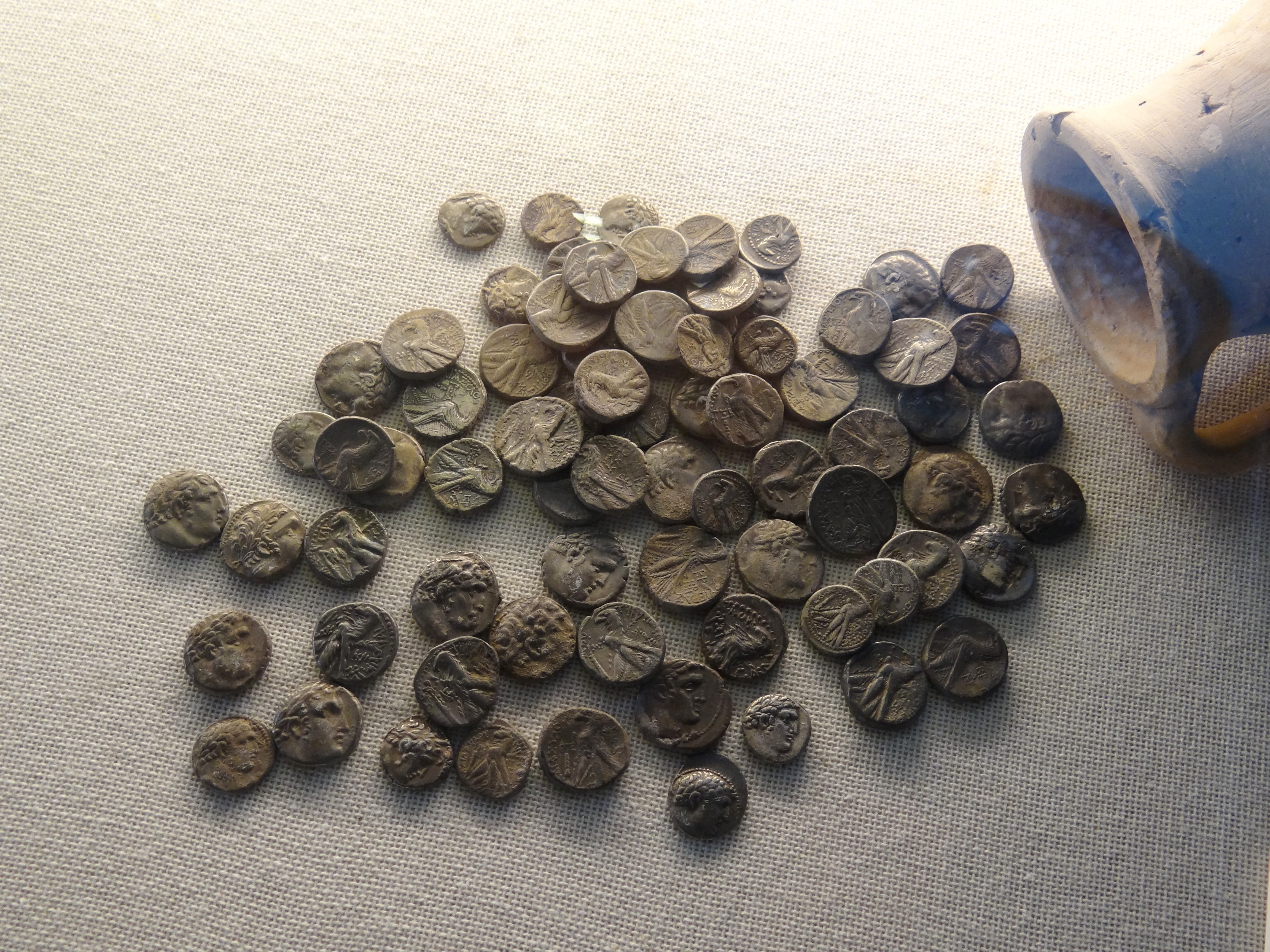 מטמון עספיא התגלה בשנת 1960 בכפר עספיא שבכרמל, מקורו בחוסיפה העתיקה. זהו מטמון הכולל 4,560 מטבעות כסף. המטמון כולל 3,400 מטבעות שקל מצור, 1,000 חצאי שקלים מצור ו-16 דינרים רומיים. באוסף מוזיאון הכט נמצאים 57 שקלים ו-24 חצאי שקלים מצור, ו- 3 דינרים רומיים. השקל הקדום ביותר באוסף הוא משנת 24/25 לפנה"ס והמאוחר ביותר הוא משנת 49/50 לספירה